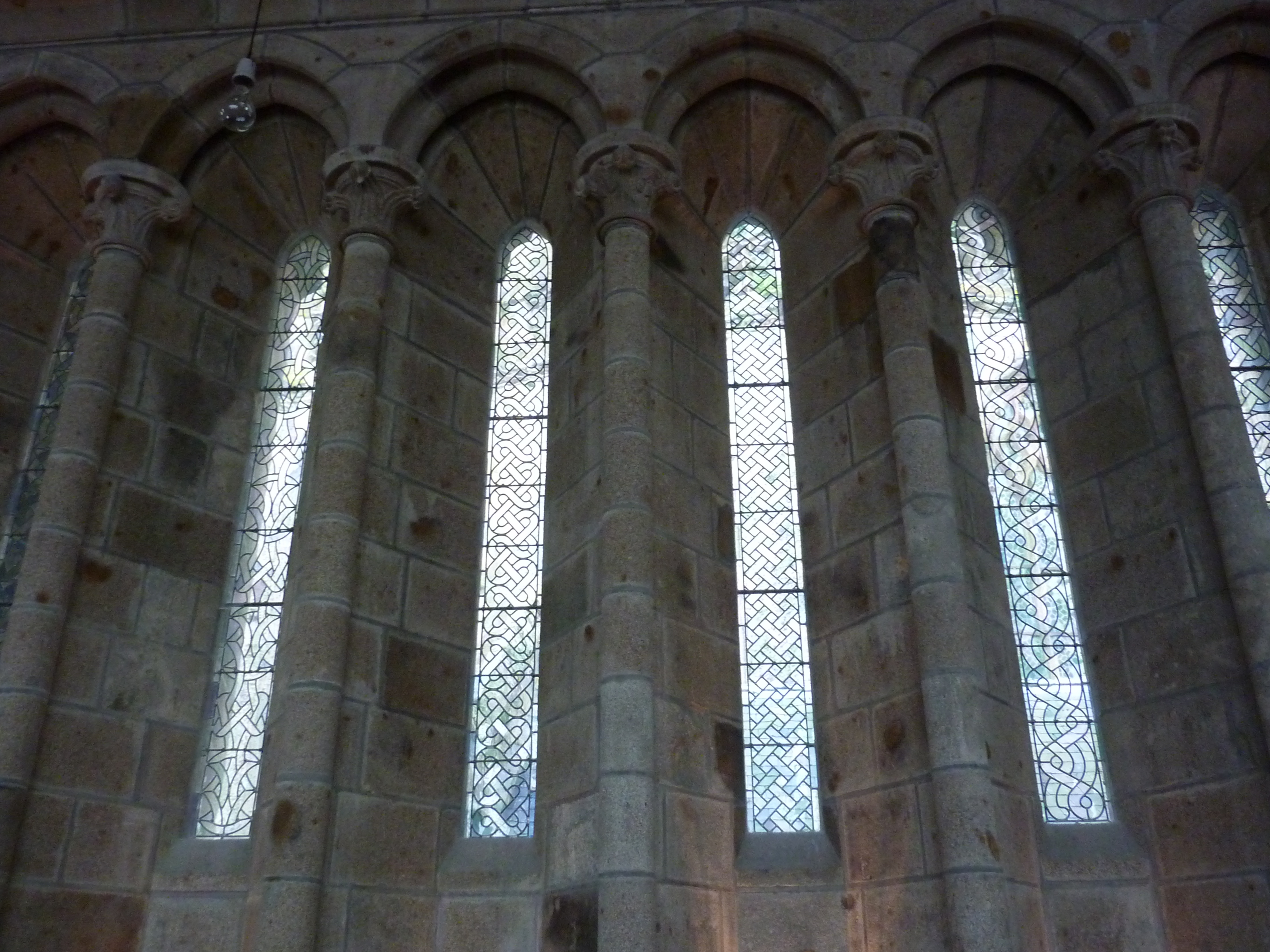 Réfectoire du Mont-Saint-Michel, fenêtres. .